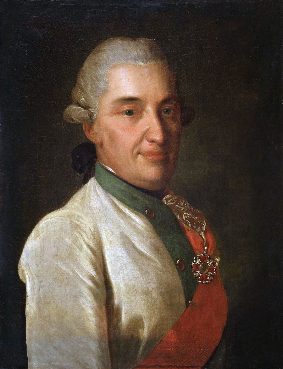 Сенявин Алексей Наумович, адмирал.